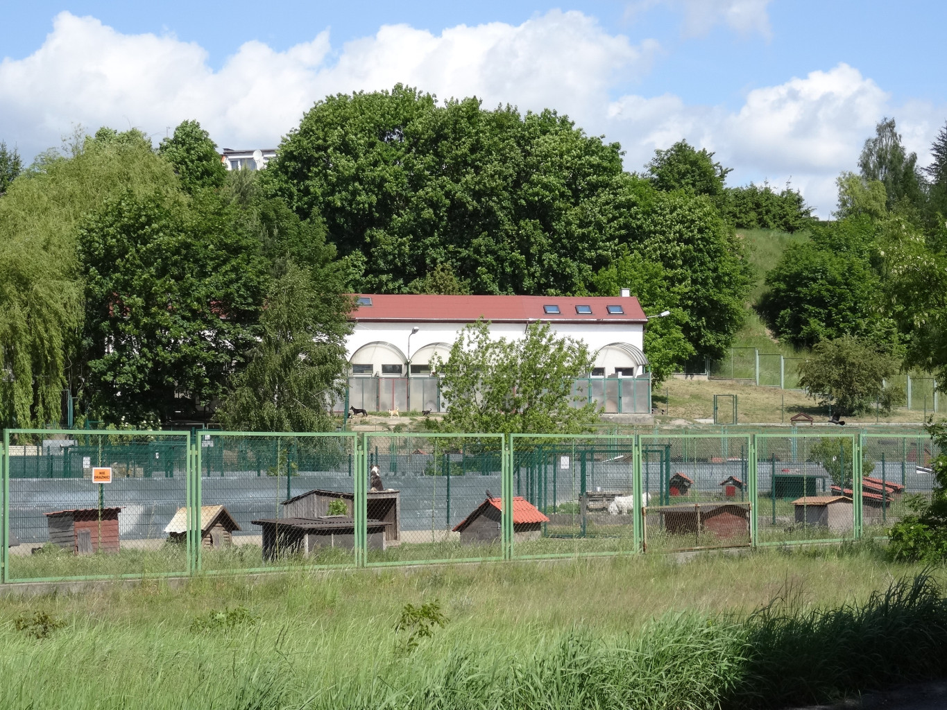 Schronisko dla zwierząt, ul. Grunwaldzka 298 w Bydgoszczy (Osowa Góra)